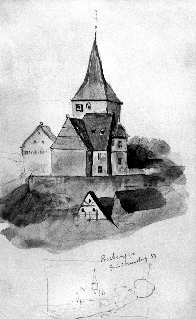 Beihinger Dorfkirche (Schefold 431c, Aquarell 12,4 x 19,5 cm; Skizzenbuch 3, Sammlung Hagmayer